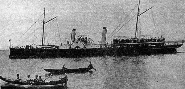 Яхтата "Александър I"